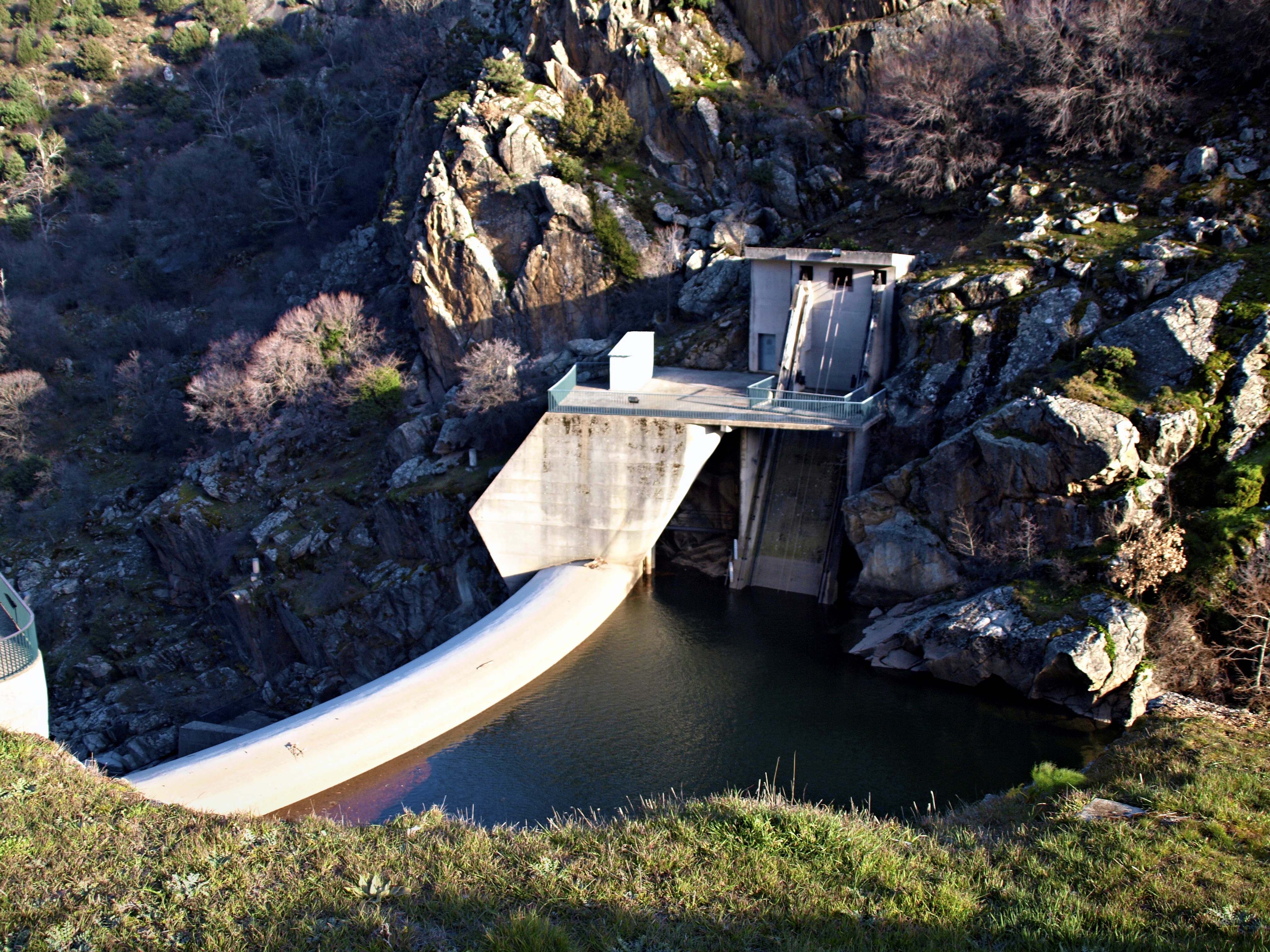 Corscia (Corsica) - Barrage sur le Golo